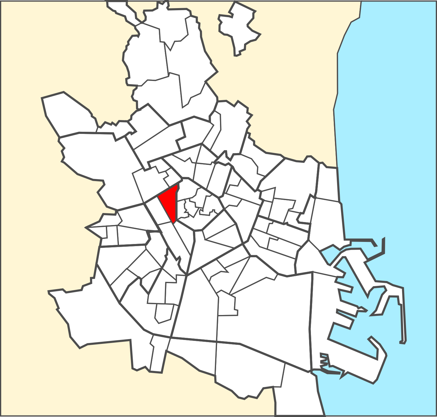 Localització del barri dins de la ciutat de València.